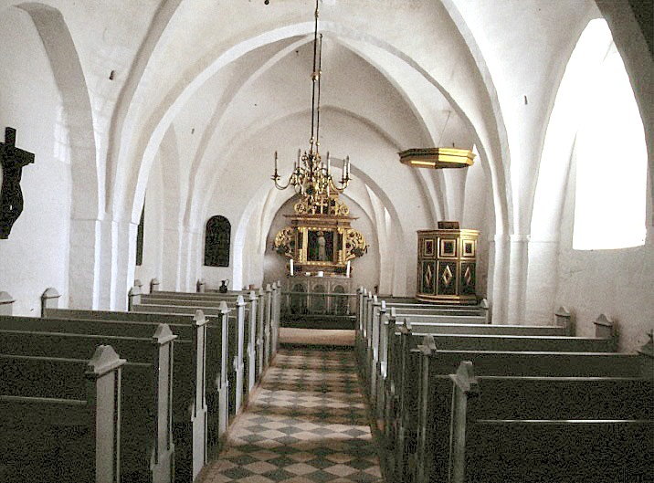 Enslev Kirke i Danmark. Skibet set mod øst